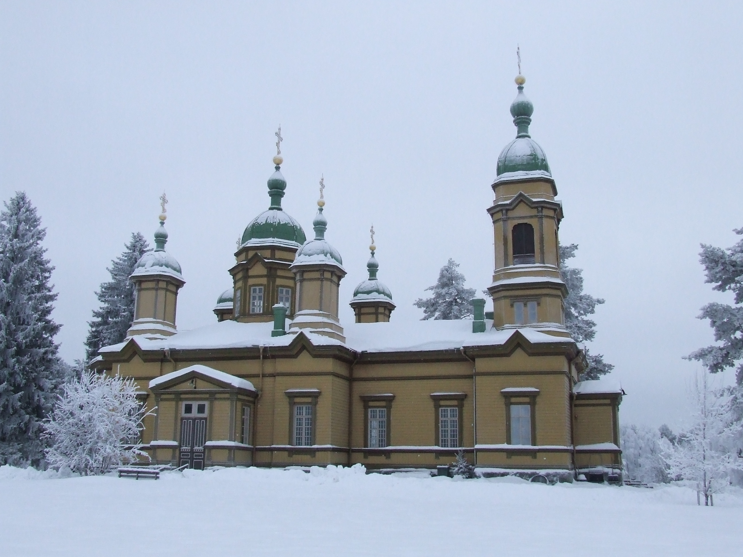 Ilomantsin ortodoksinen kirkko tammikuussa 2015